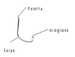 amo da pesca